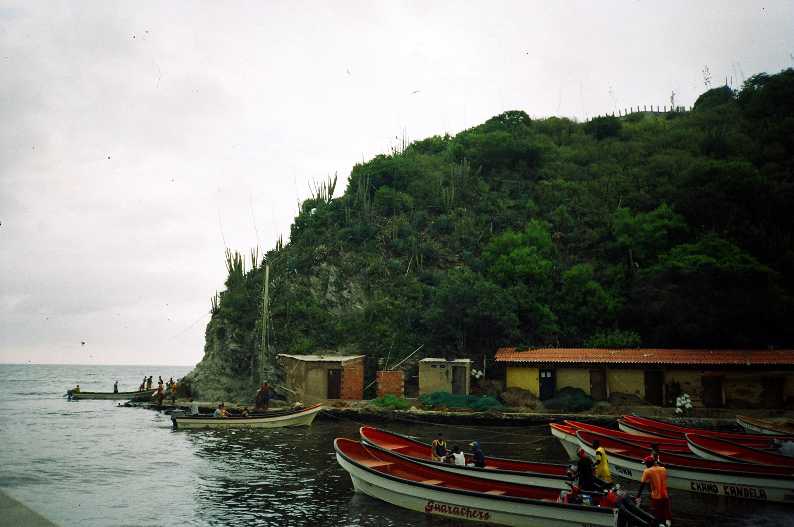 Ships in Puerto Columbia, Choroni, Venezuela